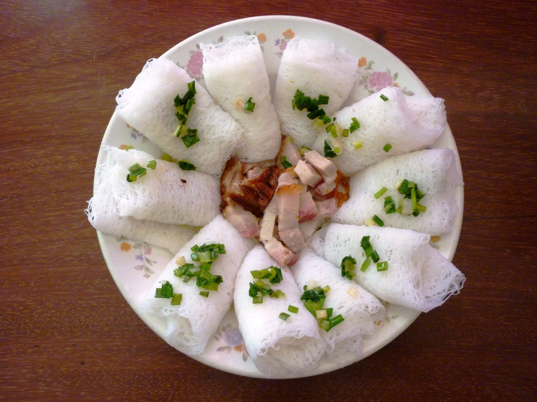 Bánh hỏi là món ăn quen thuộc với nhiều người Việt Nam, thường dùng với thịt heo quay cuốn rau sống và chấm nước mắm.